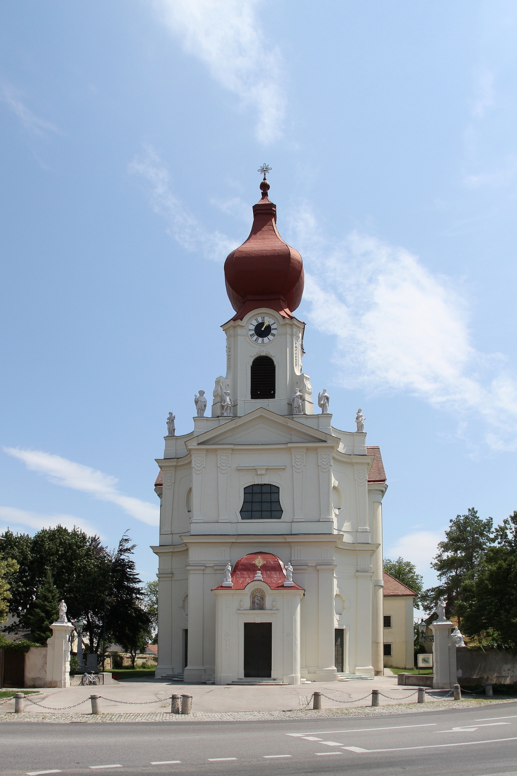 Die kath. Pfarrkirche hl. Jacob der Ältere in der niederösterreichischen Marktgemeinde Pottendorf.